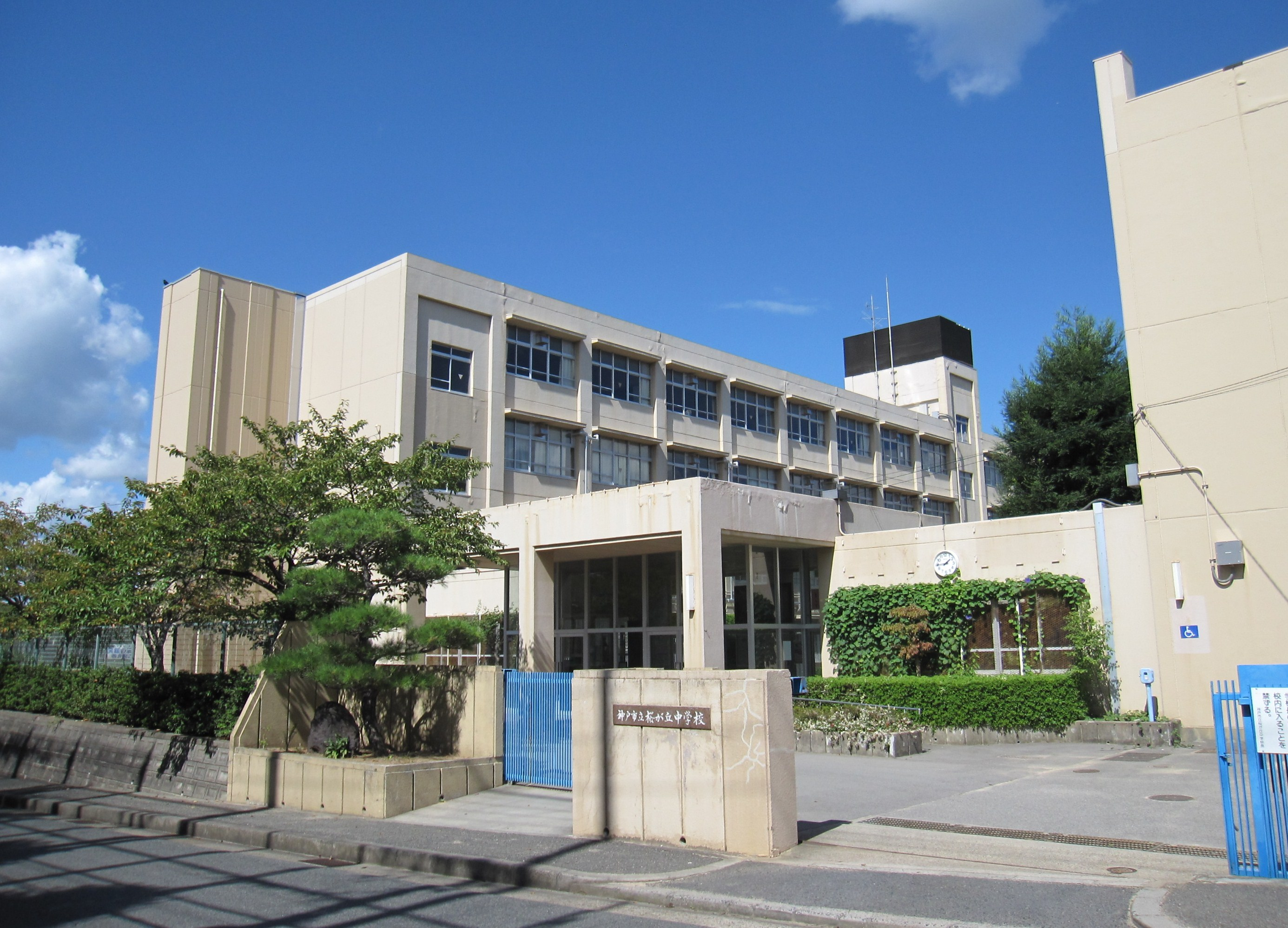 神戸市立桜が丘中学校